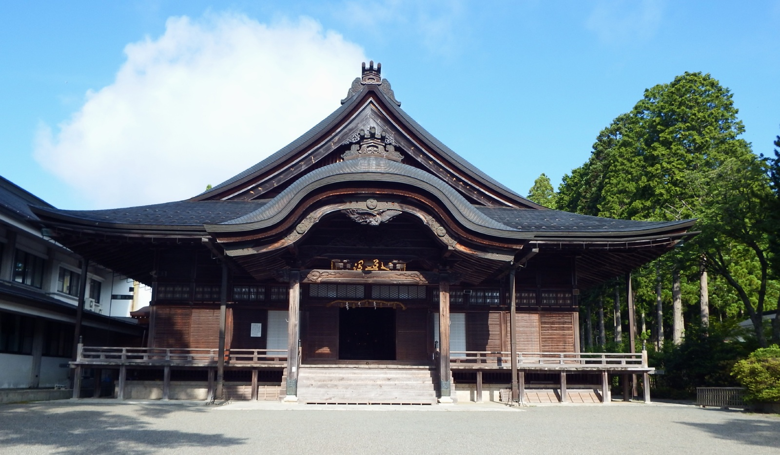 高野山 大師教会